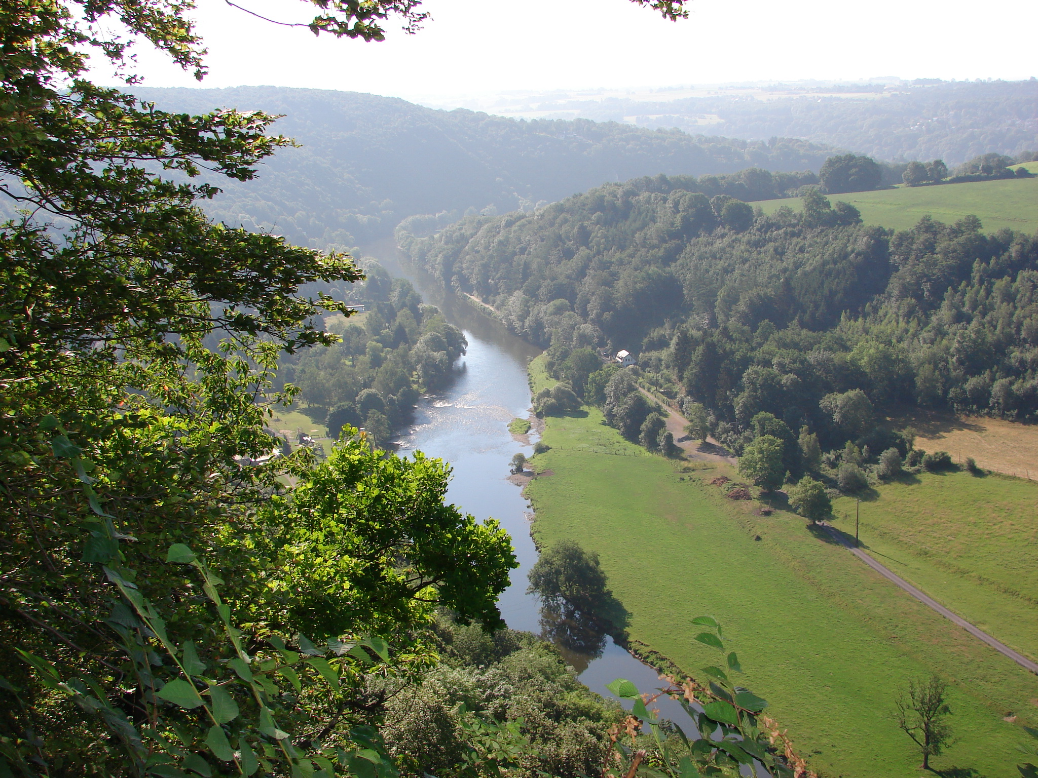 Vue du Point de vue, la Roche-aux-Faucons, Esneux